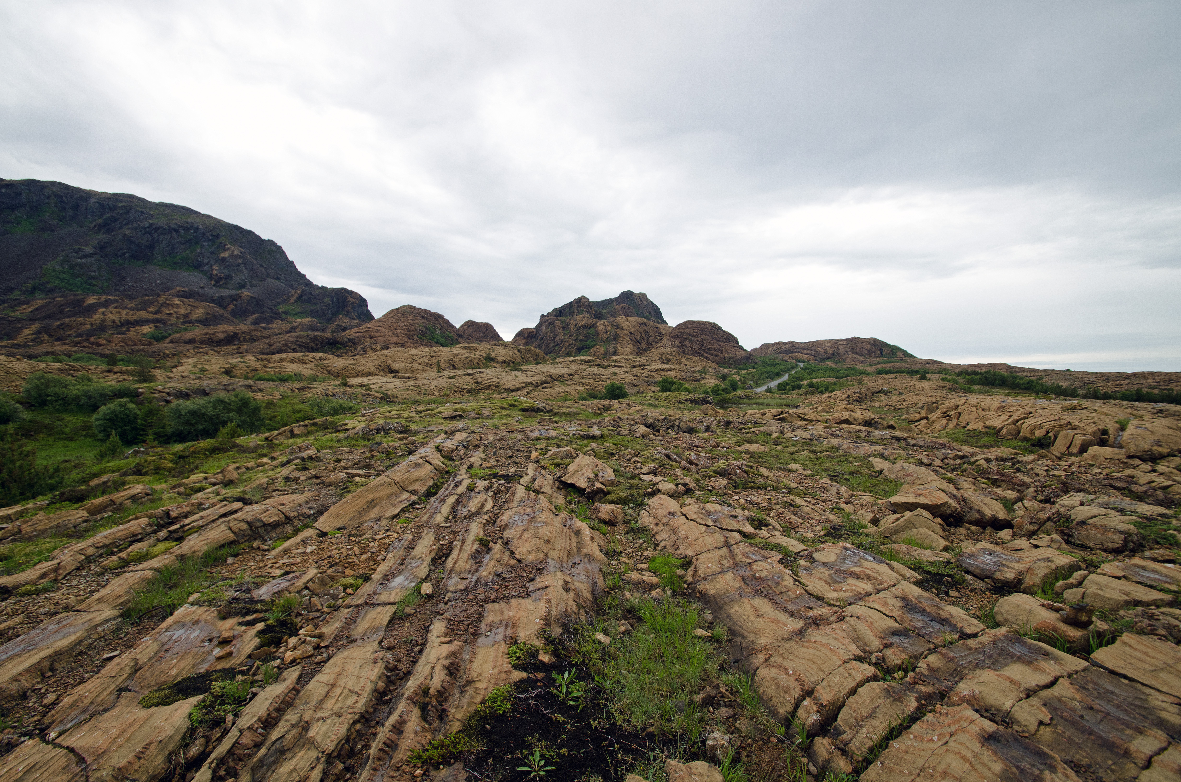 Leka island